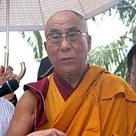 达赖喇嘛在台湾甲仙乡小林村举行法会后讲话。